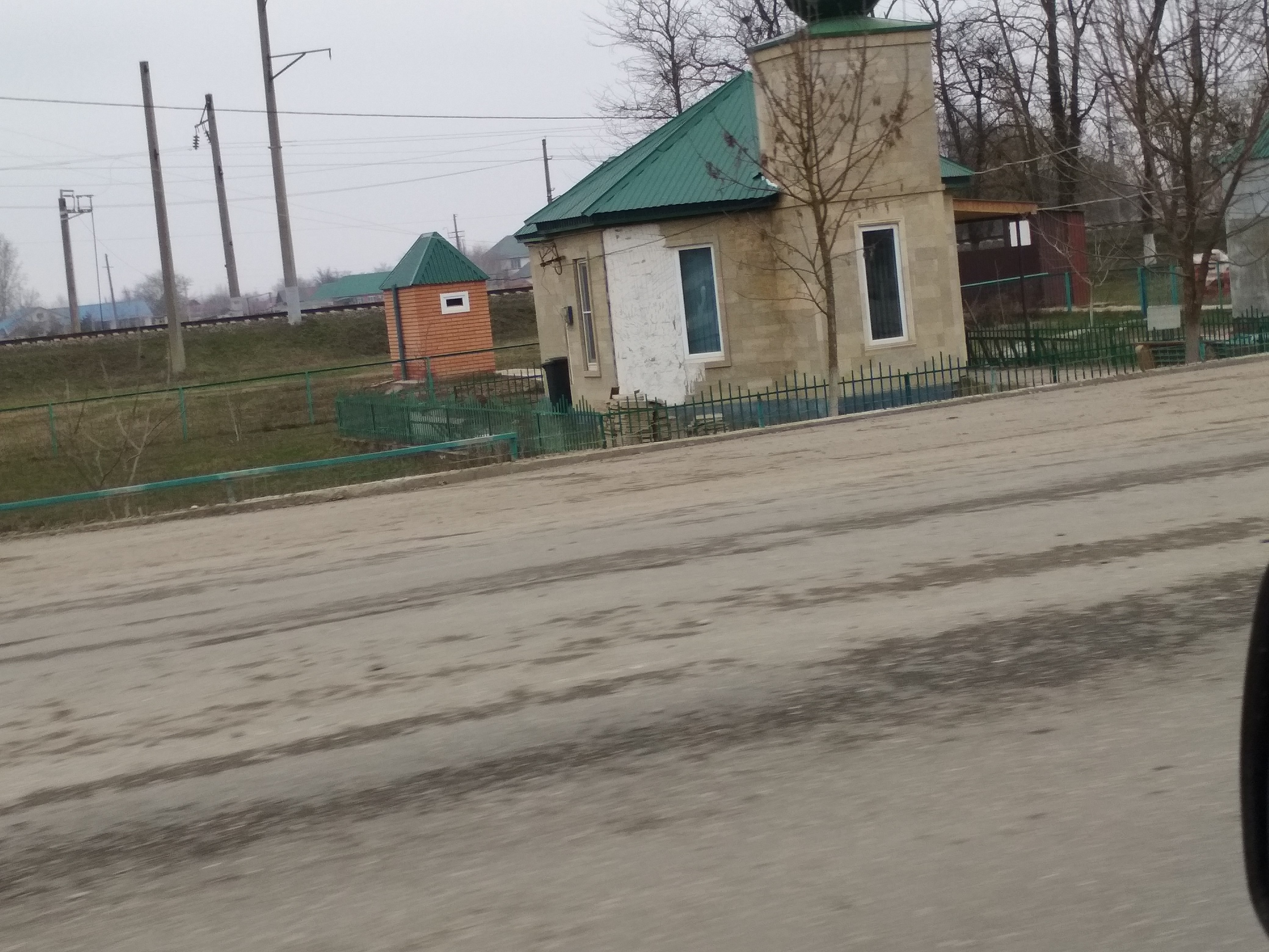 Нохчийн: Мечеть у въезда в Новотерскую